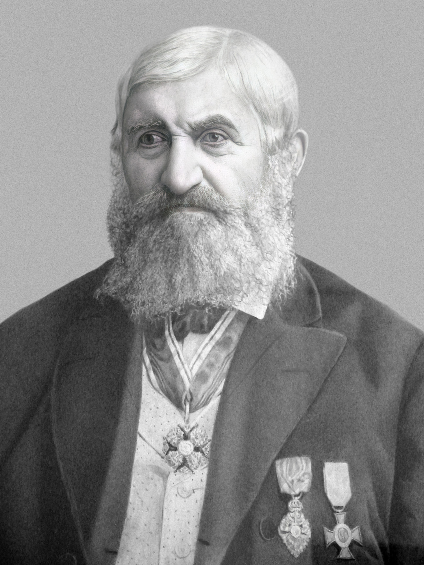 Конрад Шик